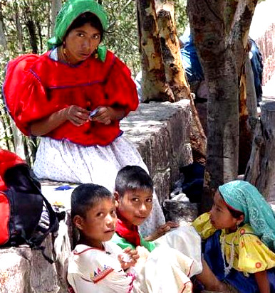 Los indigenas de Zacatecas son una mezcla de Zacatecos, Guachichiles y Caxcanes.